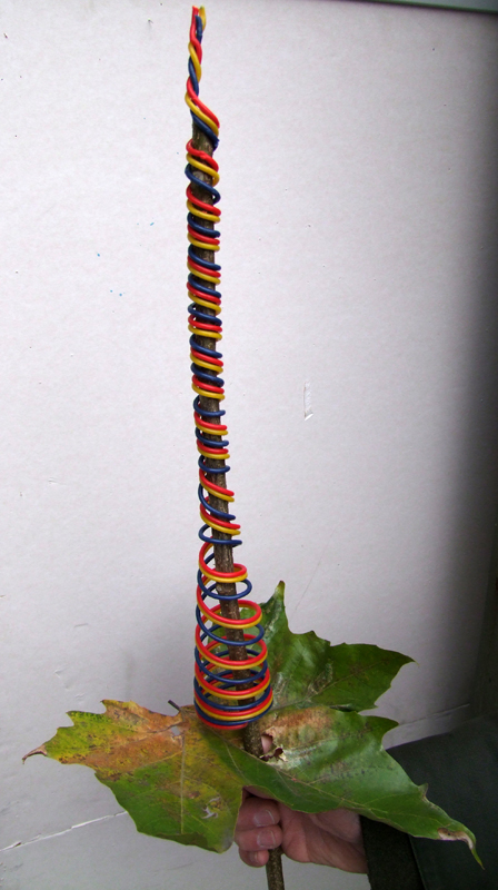 Newweling